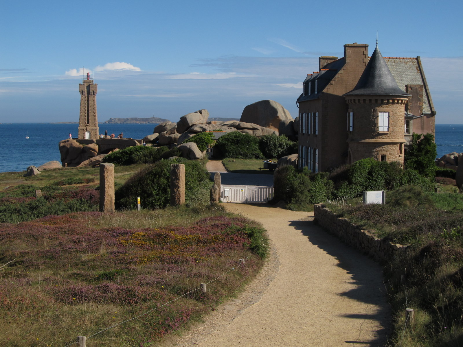 Ploumanac'h